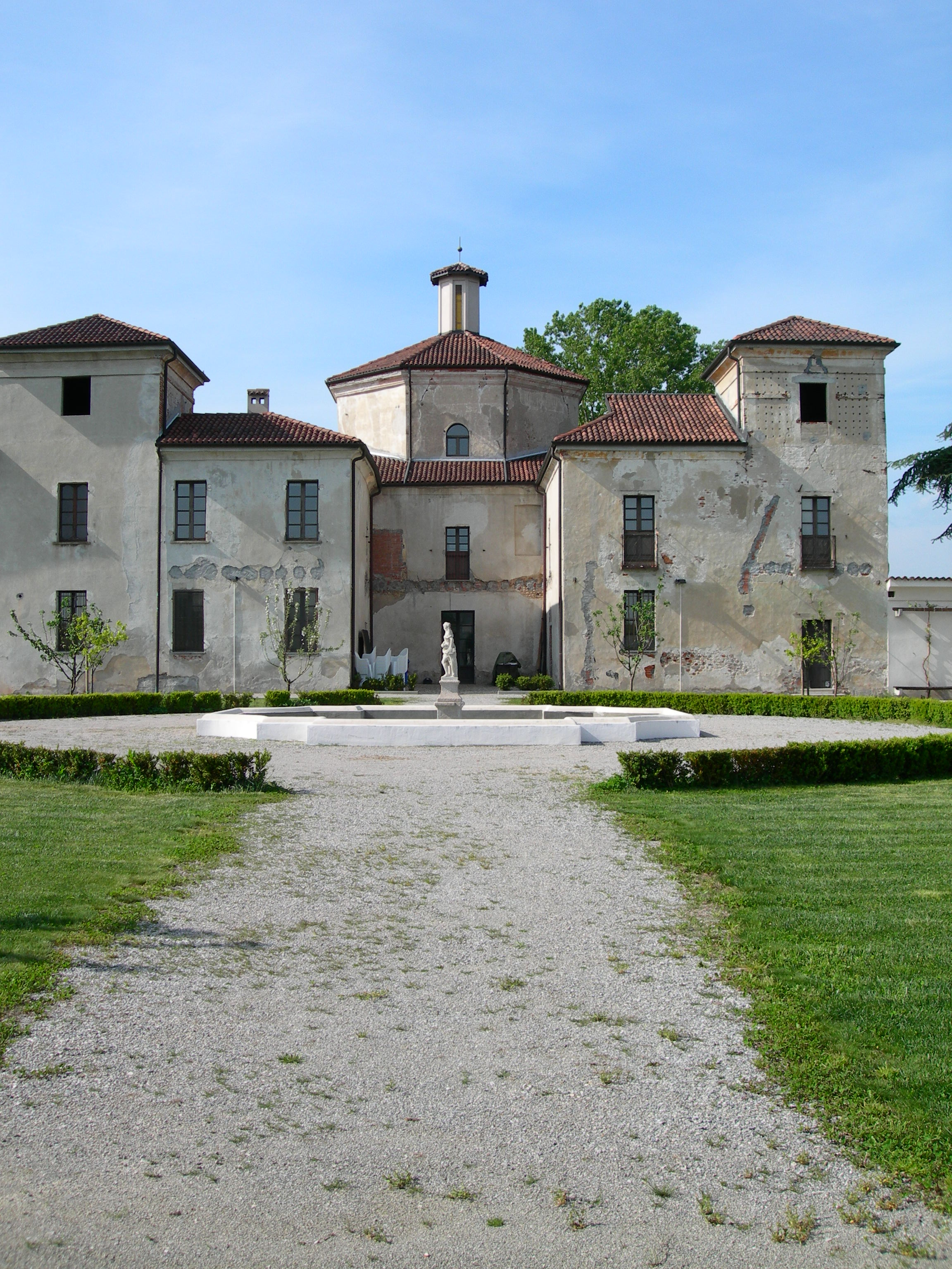 Villa Picchetta a Cameri (NO). Scattata con Nikon coolpix